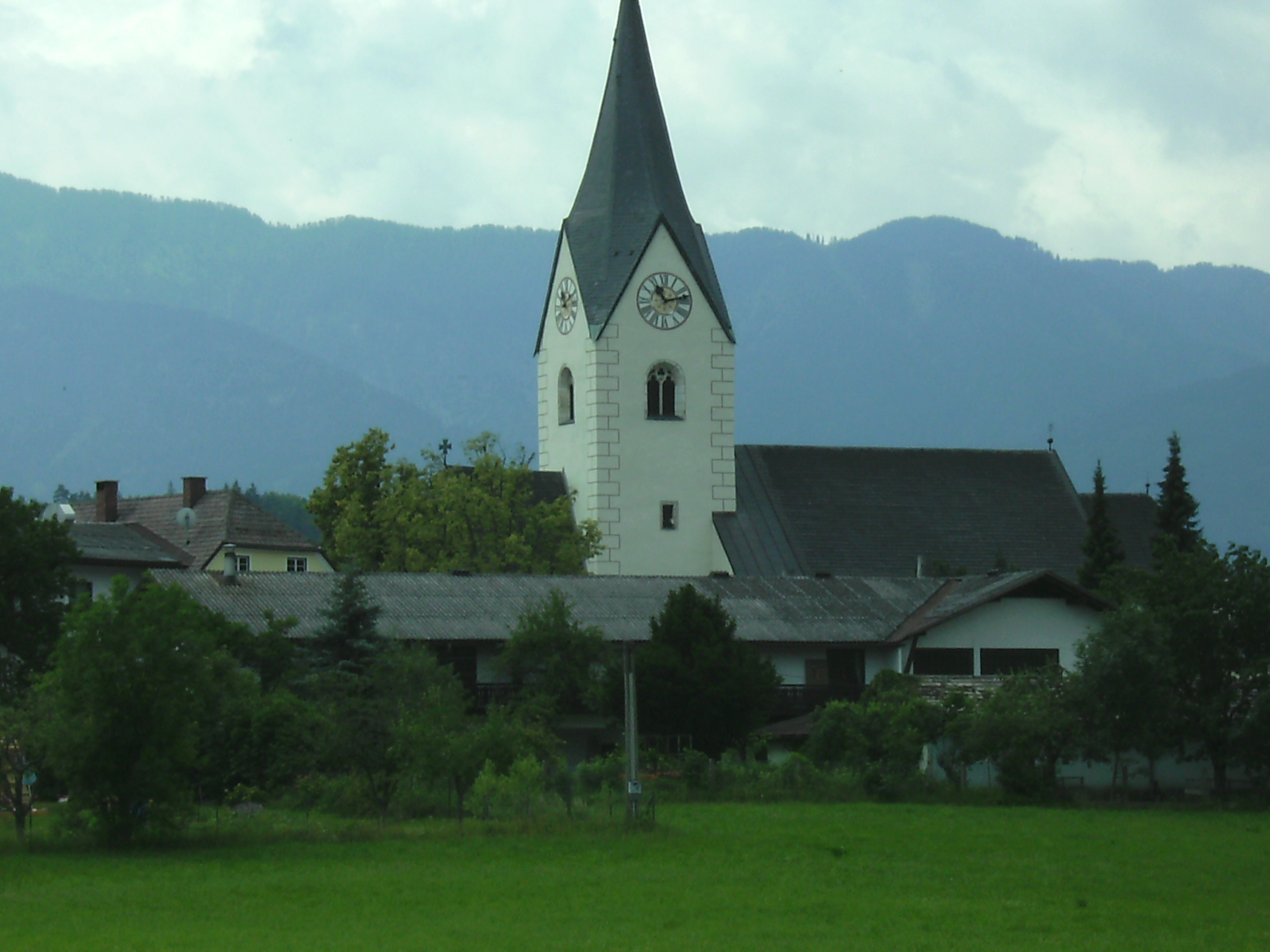 Wallfahrtsort Maria Gail (Südkärnten) mit Kirche